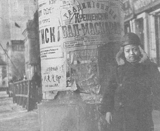 版权过期